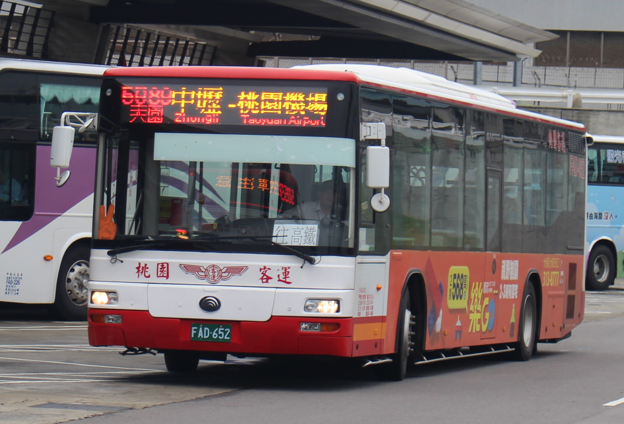 桃園客運 2016 YUTONG ZK6128HG FAD-652 5089